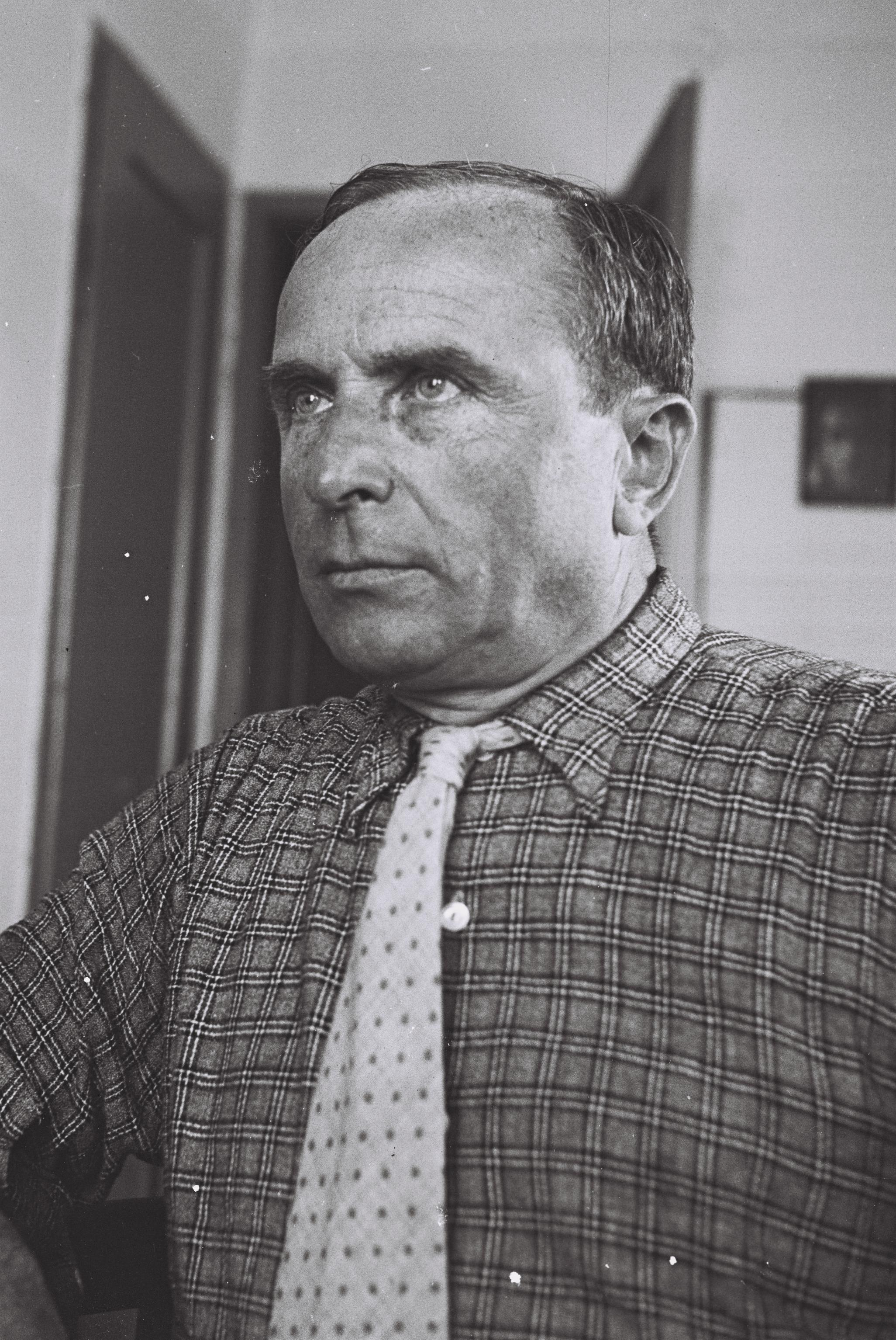 המשורר העברי, אביגדור המאירי.